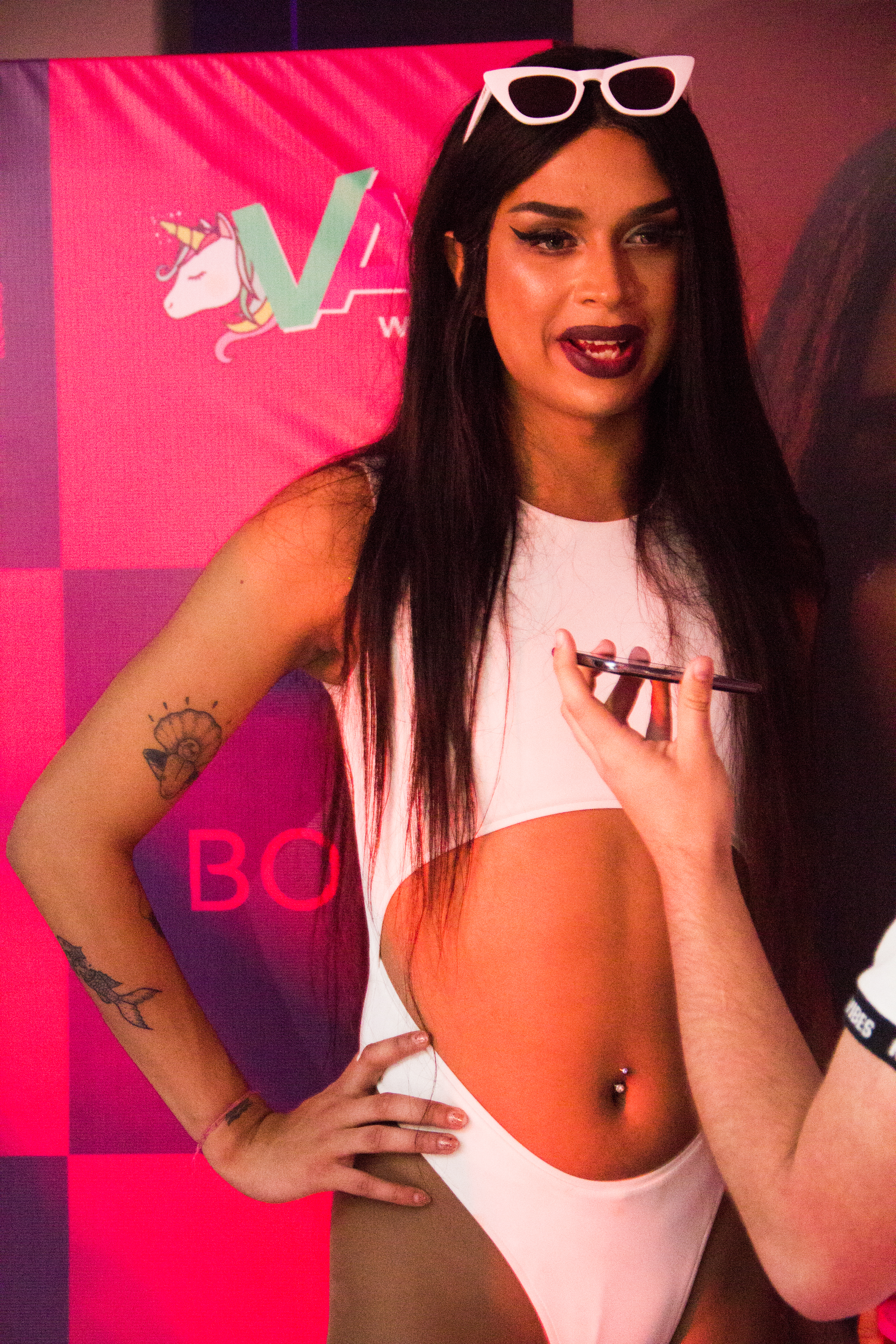 Lia Clark no Meet & Greet de Curitiba/PR